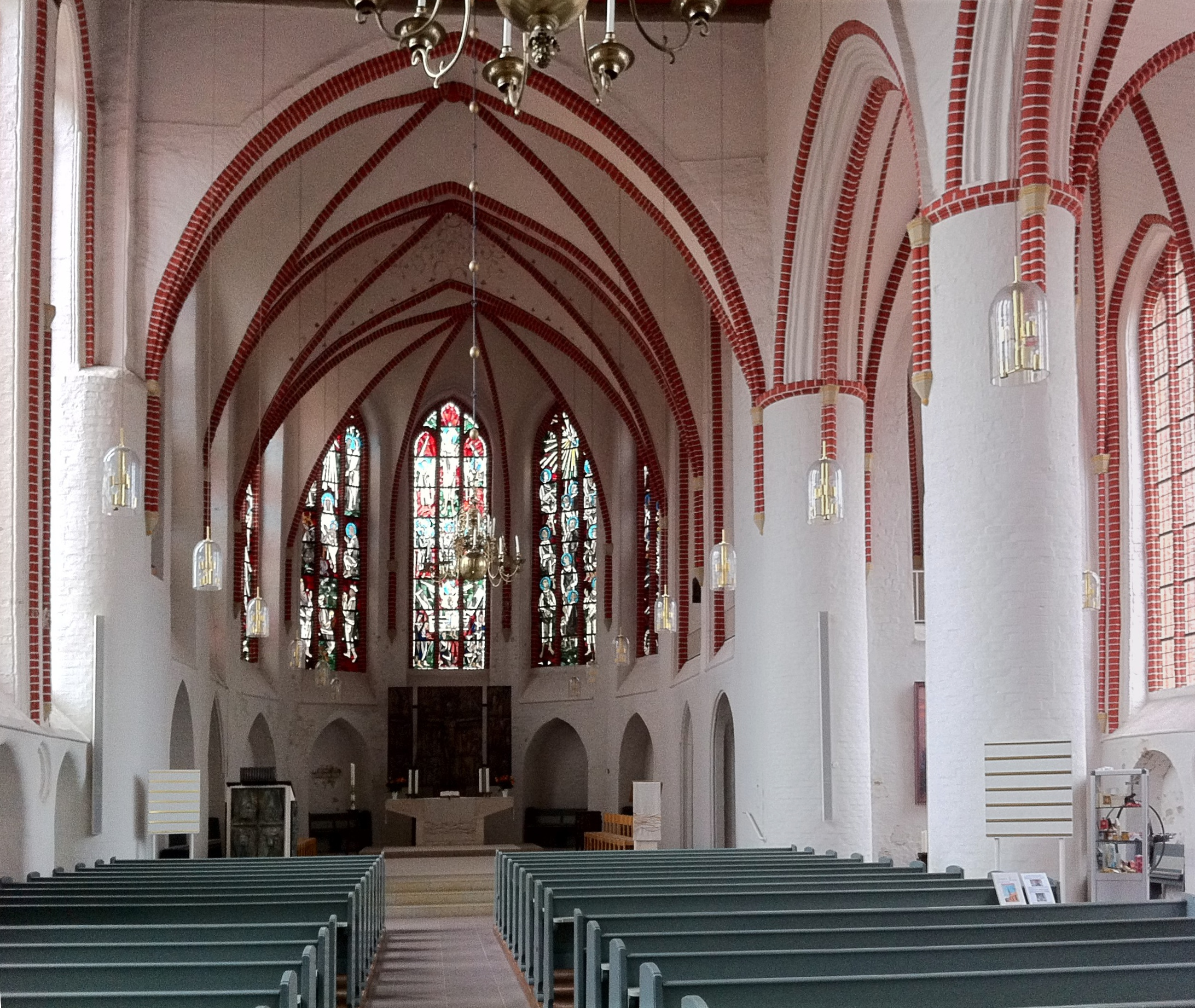 Innenansicht der St. Marien Kirche in Winsen (Luhe)